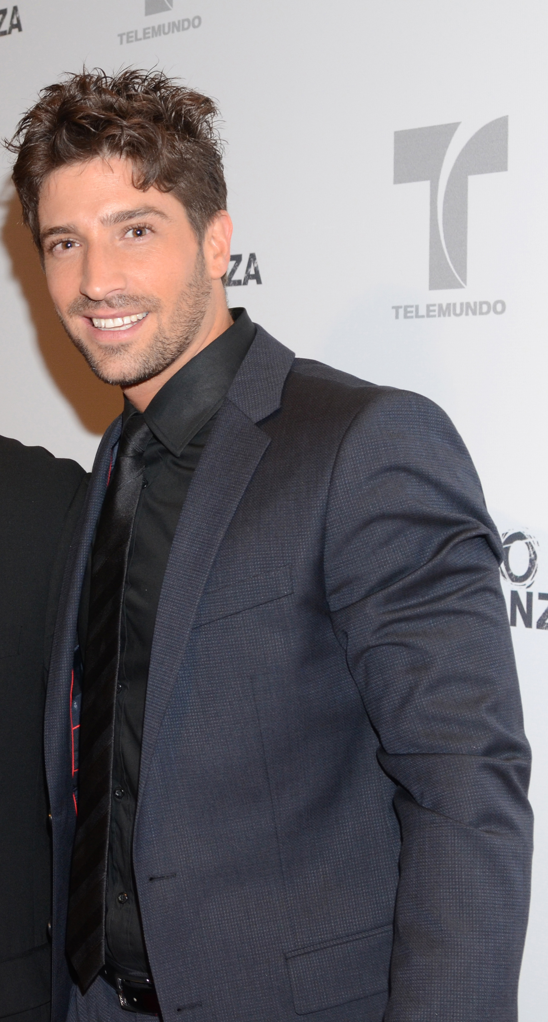 Nacido en Argentina.